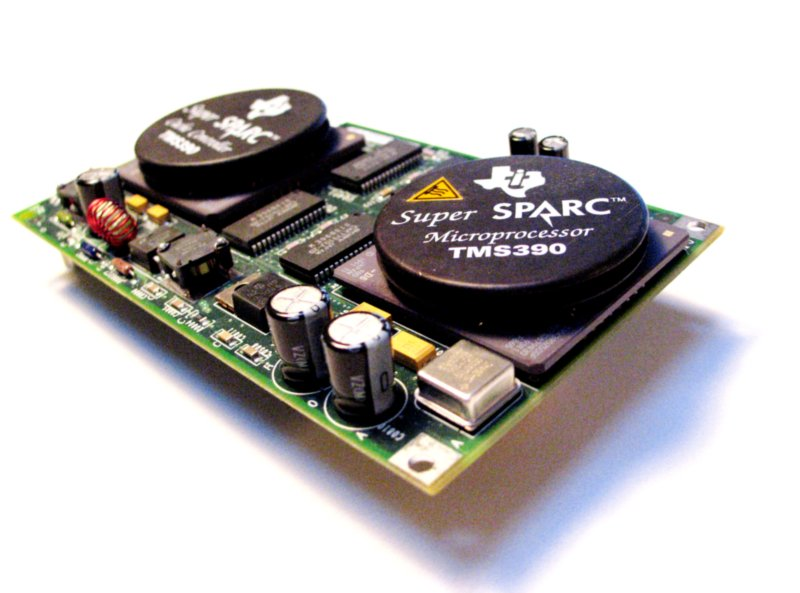 Sun SuperSPARC SM51 Module @ 50 MHz Part Number 501-2352 Photo by Mitchell Ferschweiler